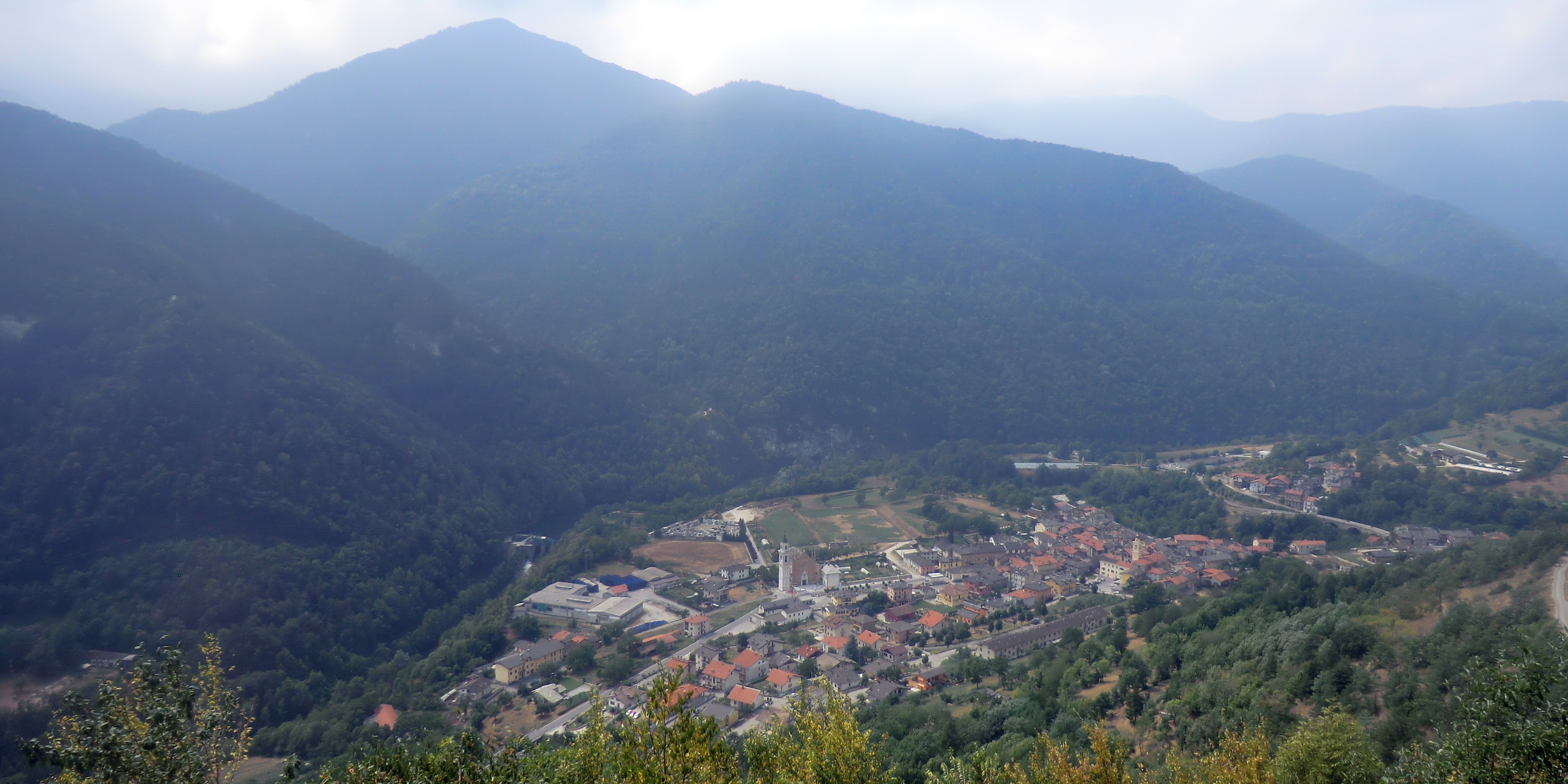 San Damiano Macra (Cuneo): panorama dalla loc. Podio